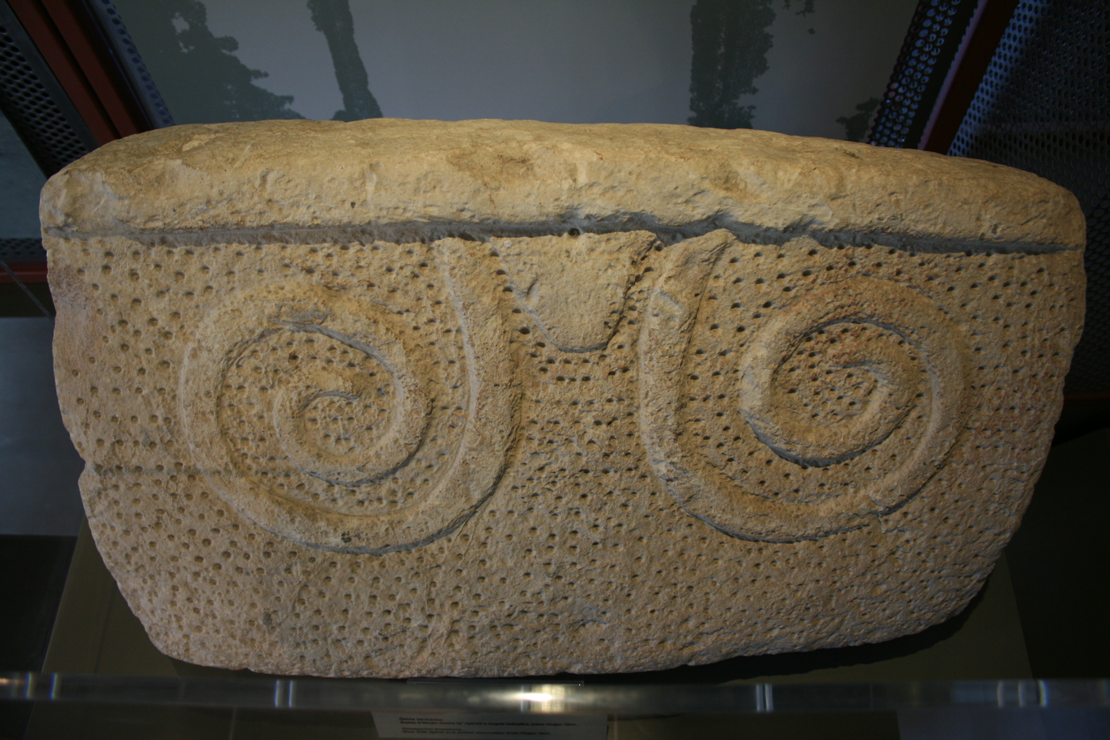 Globigerina limestone